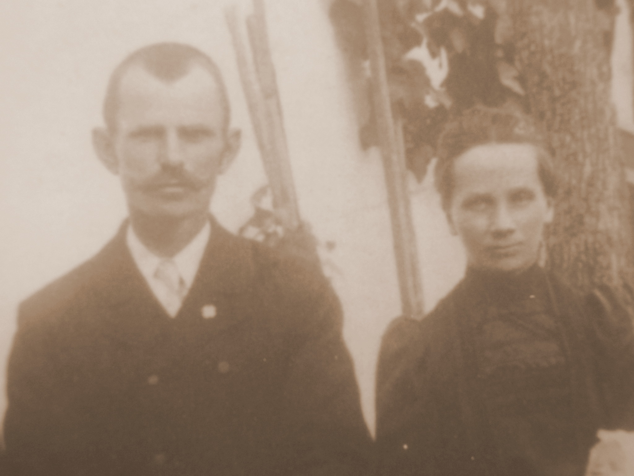 Josef Wachter mit seiner Frau Maria, 1929